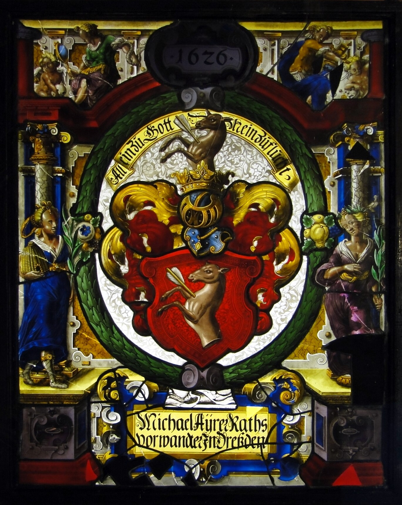 Die Ayrersche Wappenscheibe, Bleiglas mit nachträglich eingesetzten Notbleien, aus dem Jahr 1626; ursprünglich Alte Frauenkirche Dresden